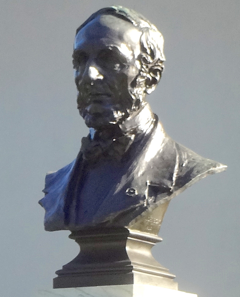 Buste du physicien genevois Jean-Daniel Colladon, dans le parc des Bastions à Genève.